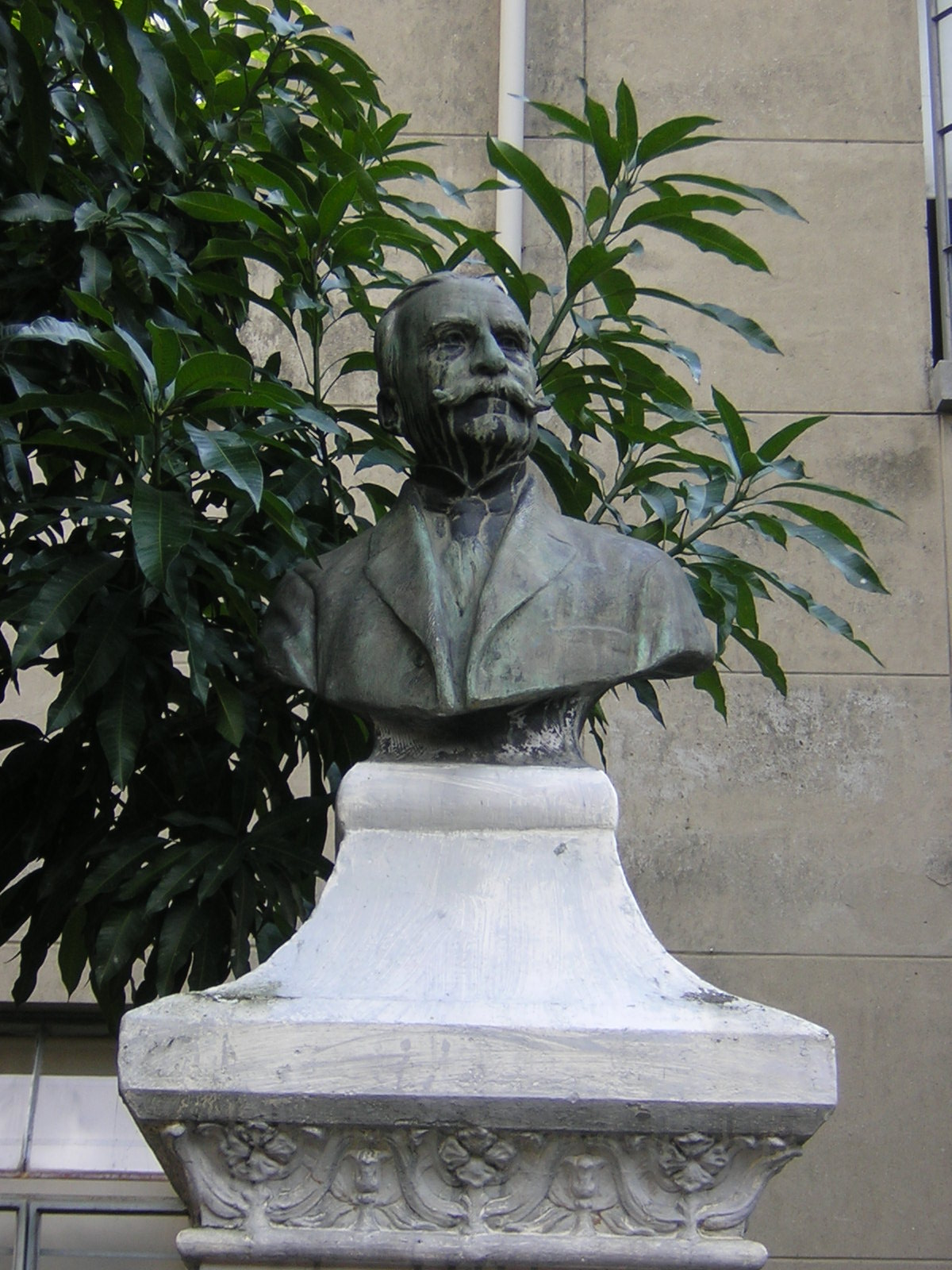 Busto de Tulio Ospina, ubicada en la Facultad de Minas, Universidad Nacional de Colombia sede Medellín.